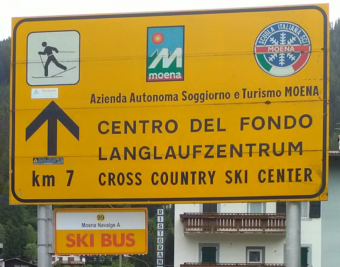 Cartello centro del fondo di Alochet - Moena